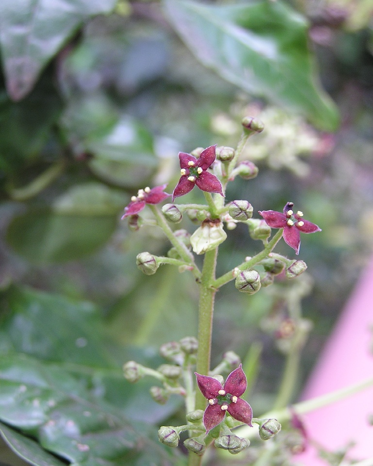 Blütenstand von Aucuba japonica, aufgenommen am Standort in einem Wald in der Nähe von Kyoto.